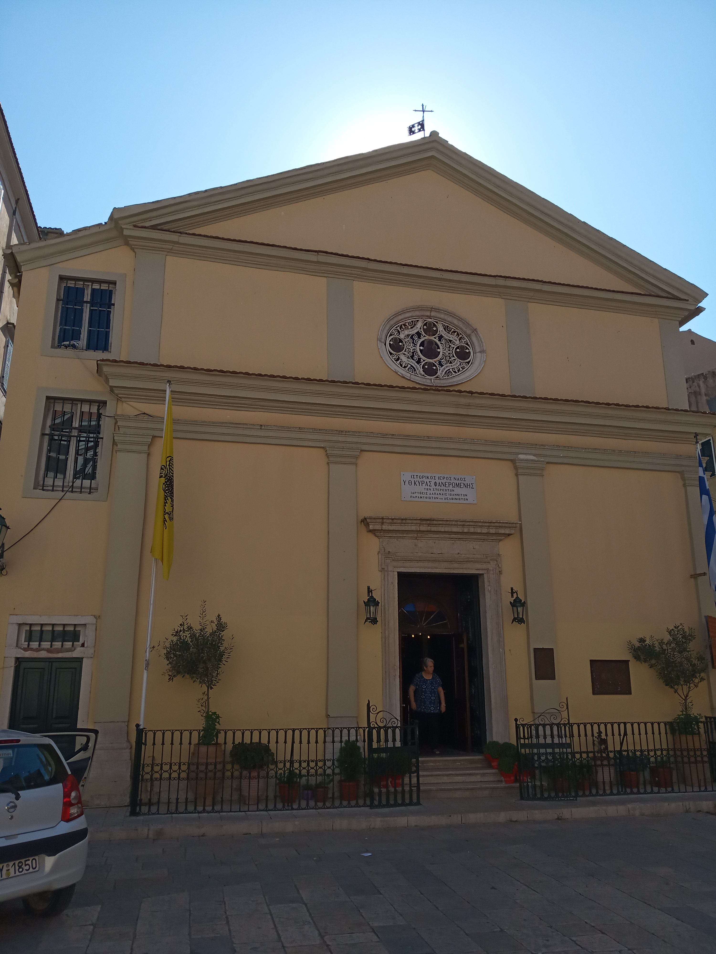 Церква Діви Марії Чужих, м. Керкіра, Virgin of Foreigners, Panagia ton Xenon